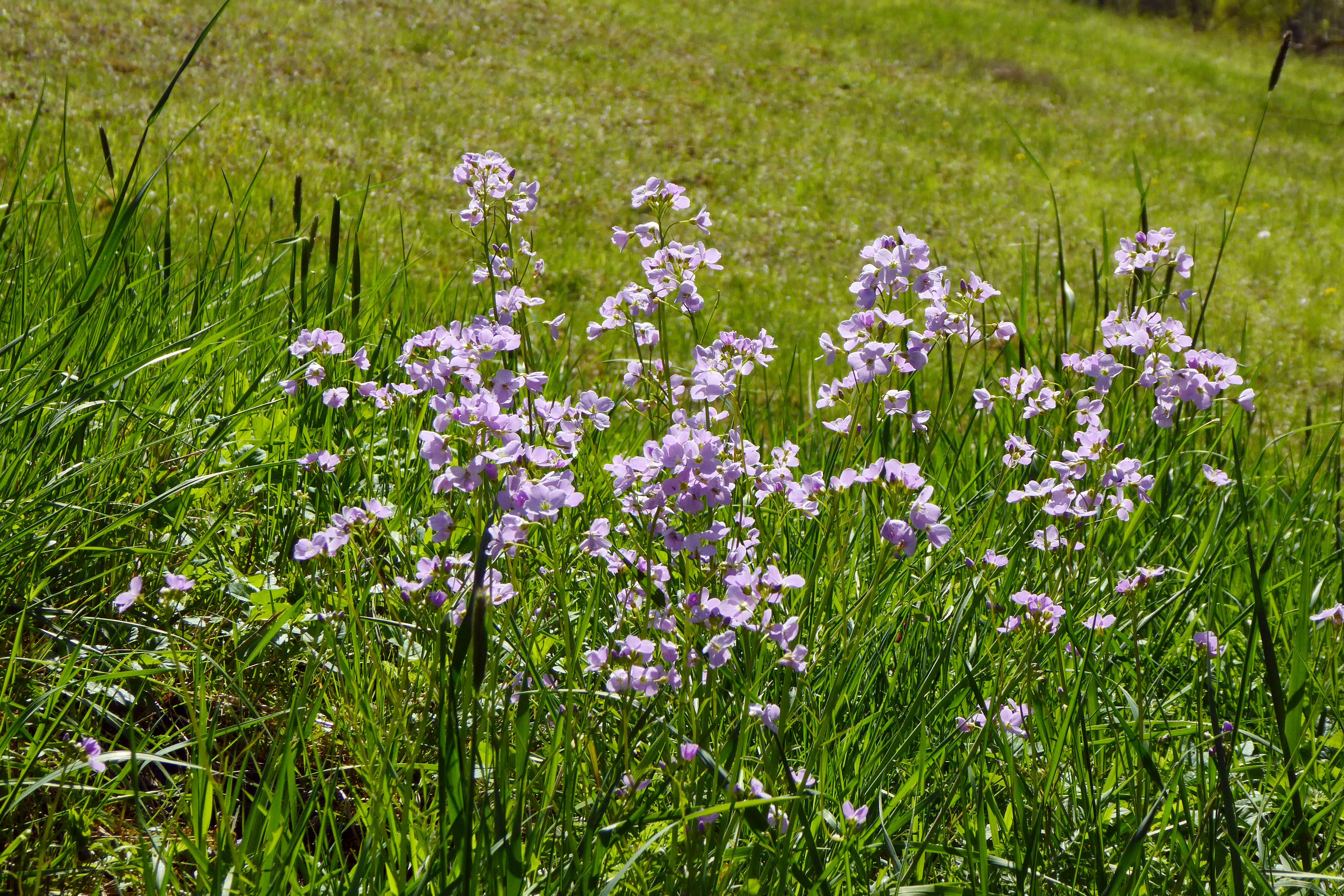 Am Fuße des Naturschutzgebietes Mergelhalde (NSG-HA 081), auf etwas feuchteren Böden, blüht im Frühjahr das Wiesenschaumkraut (Cardamine pratensis). Im Hintergrund ist der Halbtrockenrasen zu sehen, der für dieses Naturschutzgebiet typisch ist.